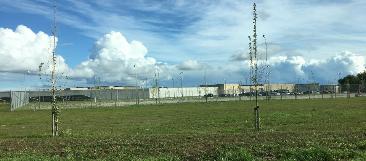 Storstrøm Fængsel på Nordfalster.